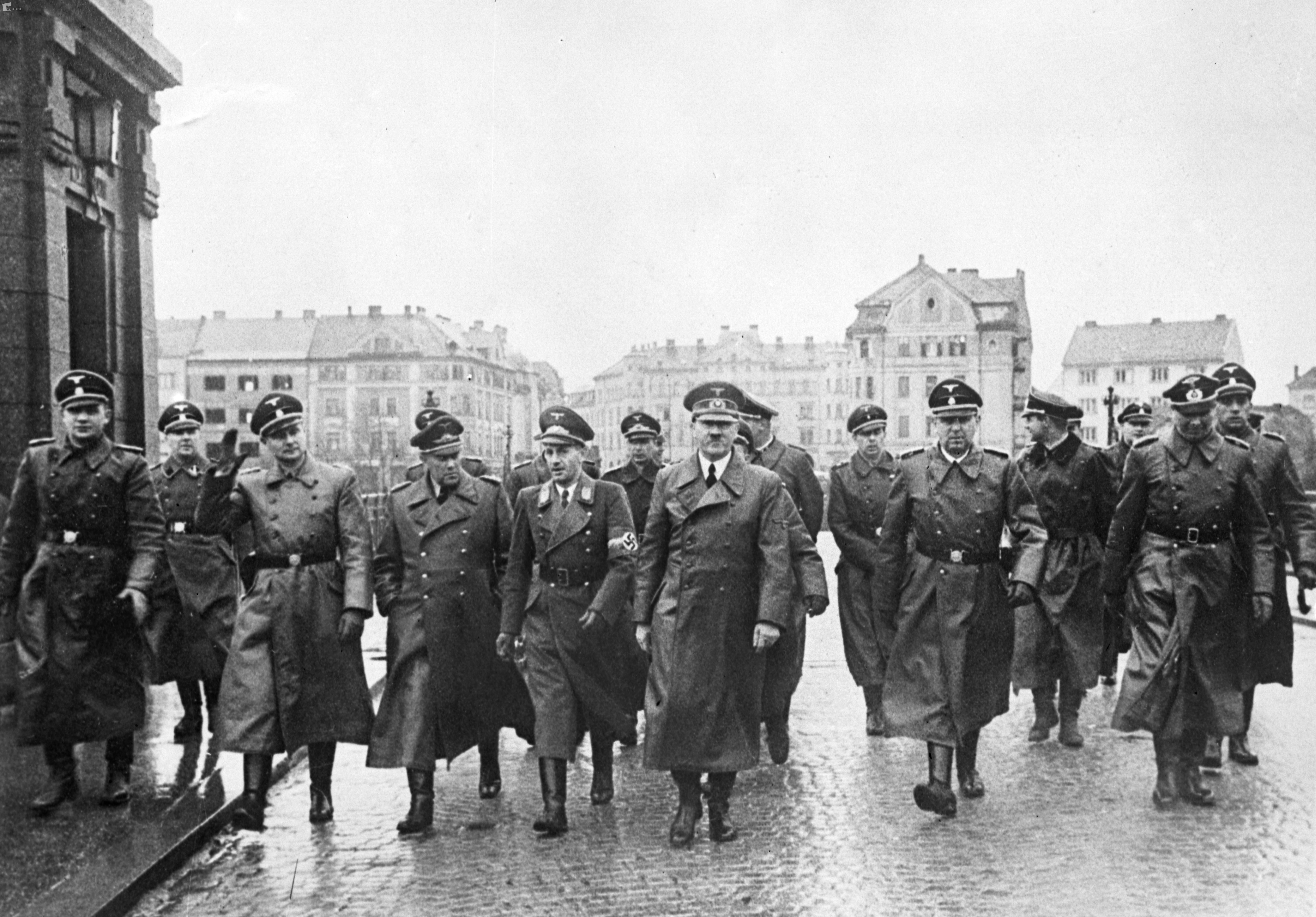 Adolf Hitler v Mariboru.